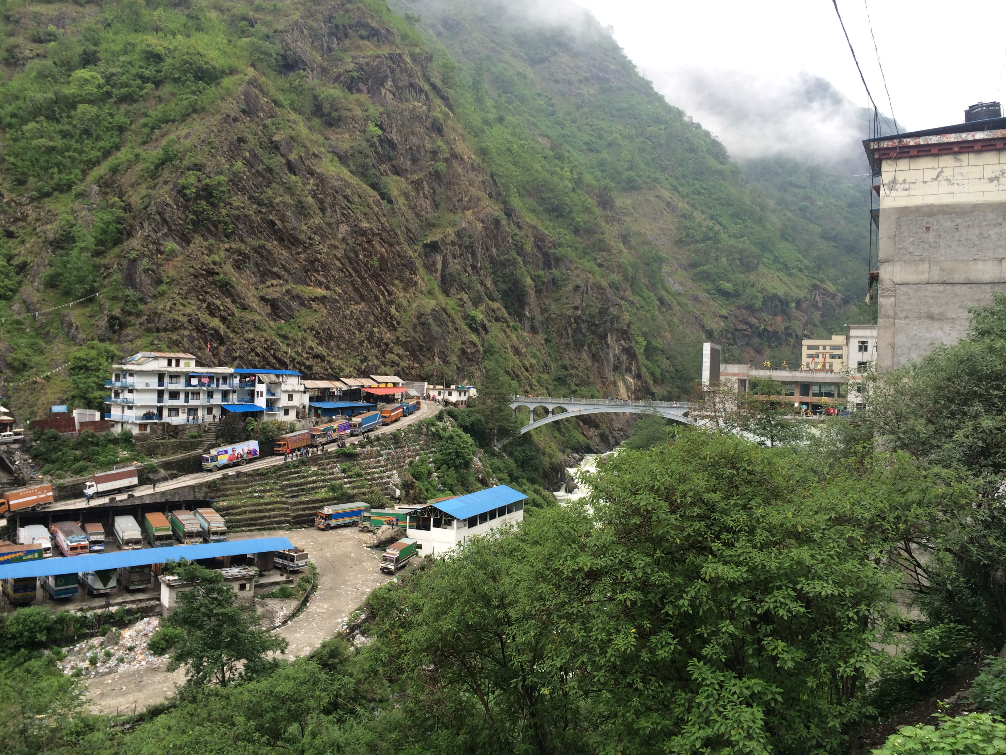 Kodari, Nepal